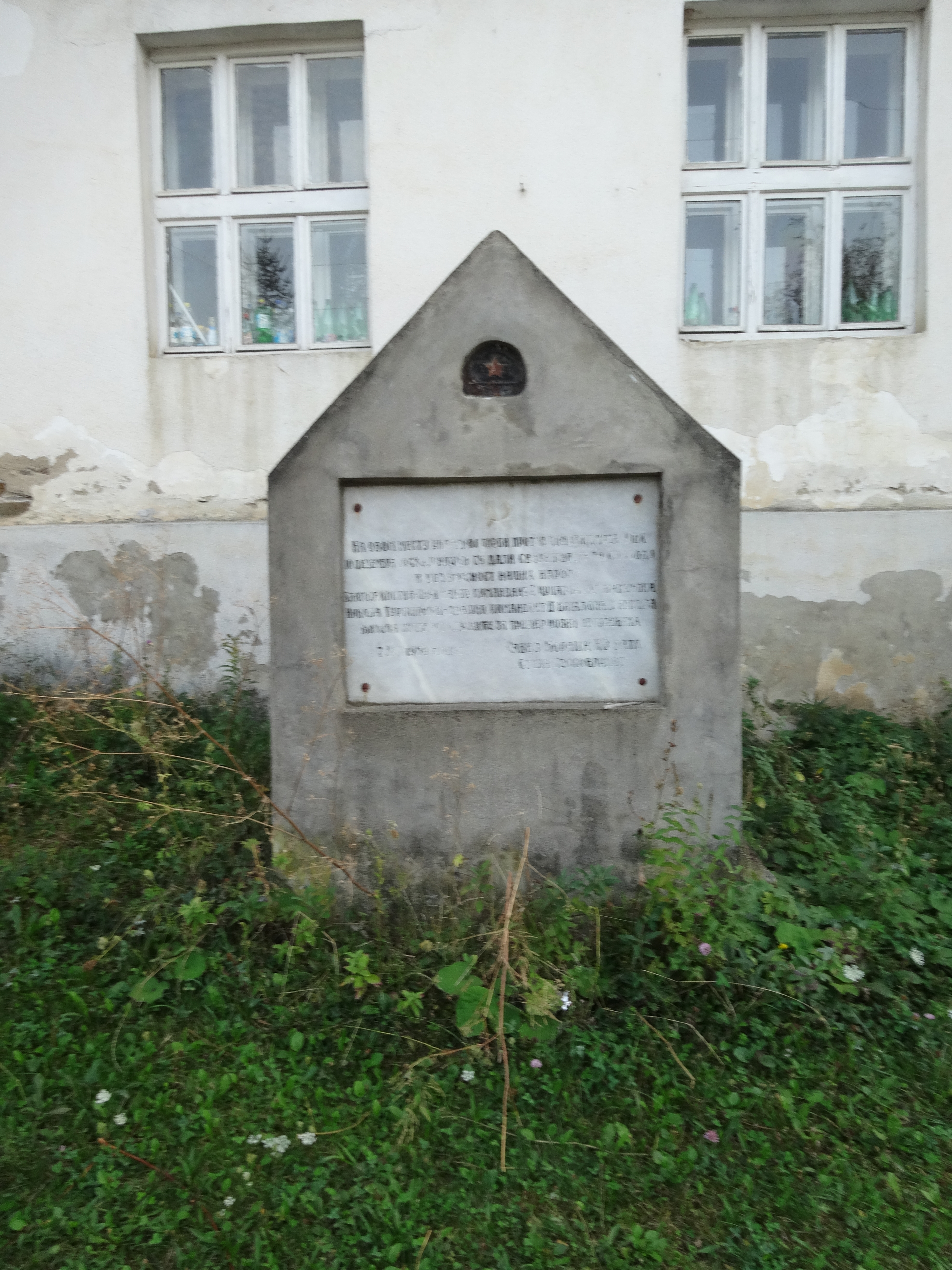 Barje, Leskovac